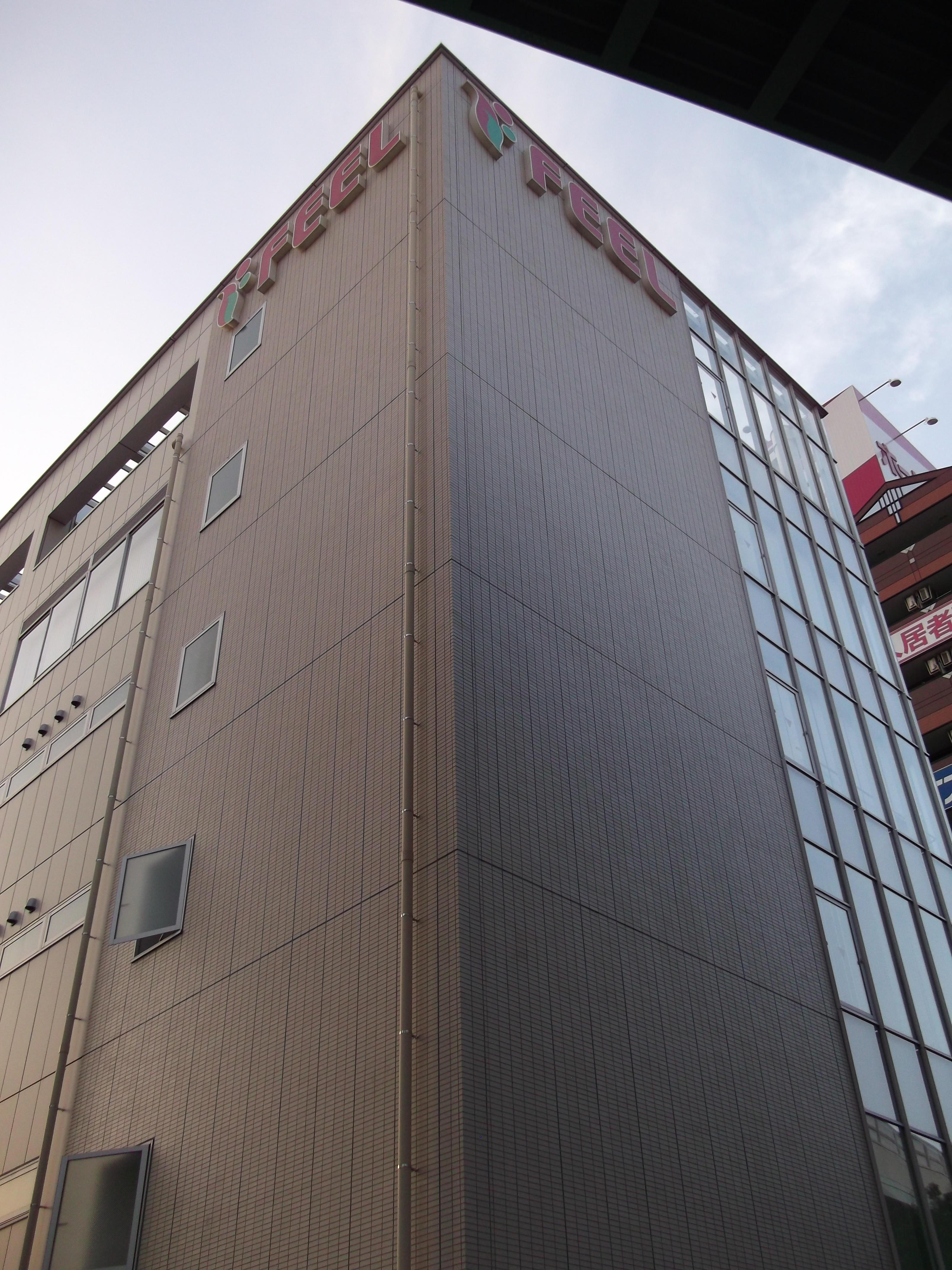 名古屋市昭和区のフィールコーポレーション本社を南東角から撮影